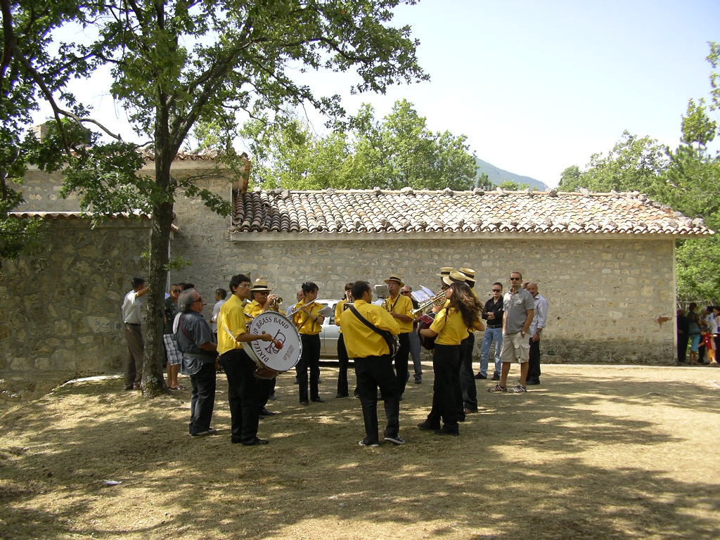 la festa dell'Assunta è allietata al colle San Nicola dalla musica della banda